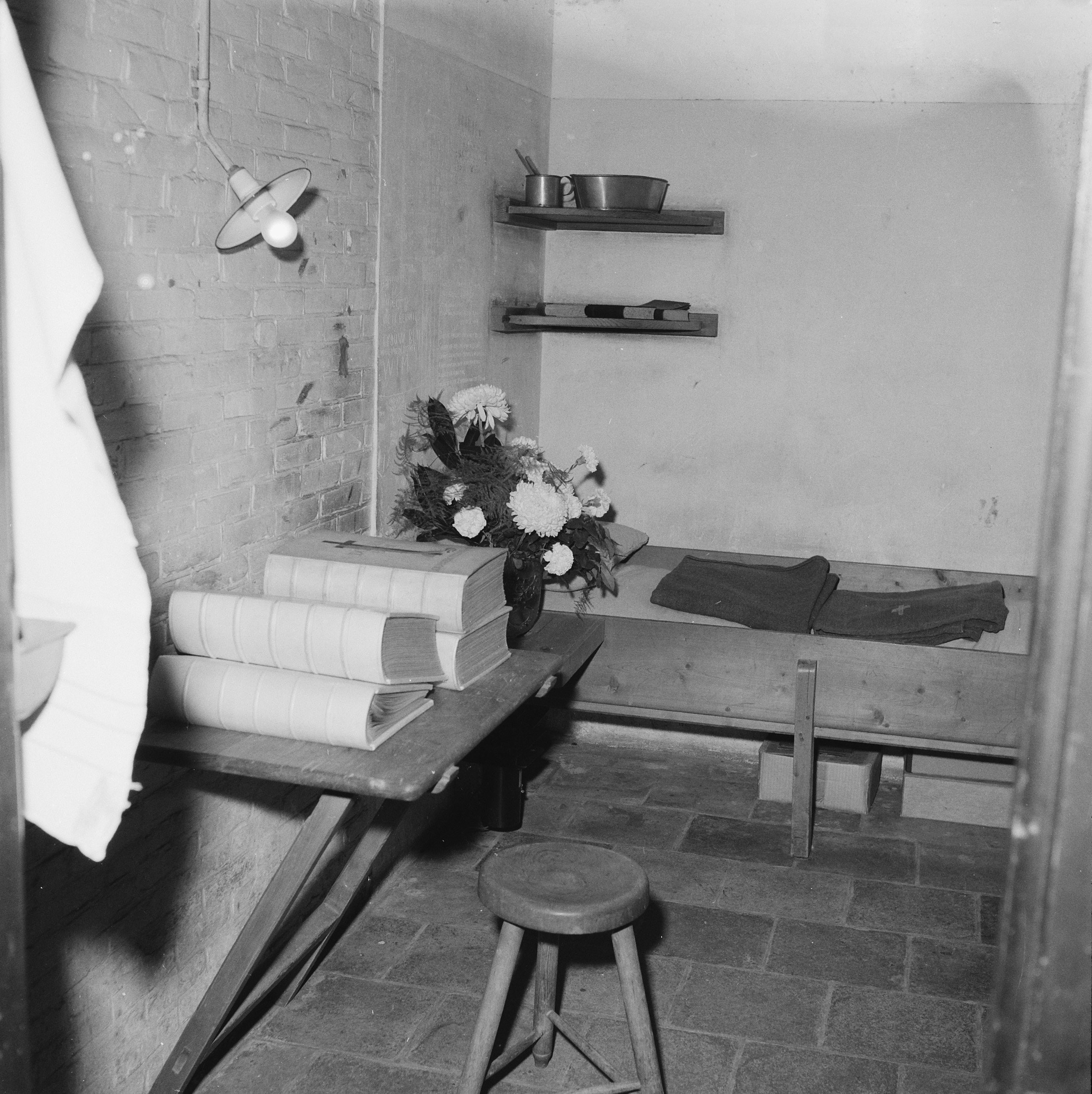 Collectie / Archief : Fotocollectie Anefo Reportage / Serie : [ onbekend ] Beschrijving : Jaarlijkse dodenherdenking Oranjehotel Datum : 10 oktober 1959 Trefwoorden : dodenherdenkingen Instellingsnaam : Oranjehotel Fotograaf : Behrens, Herbert / Anefo Auteursrechthebbende : Nationaal Archief Materiaalsoort : Negatief (zwart/wit) Nummer archiefinventaris : bekijk toegang 2.24.01.03 Bestanddeelnummer : 910-7358